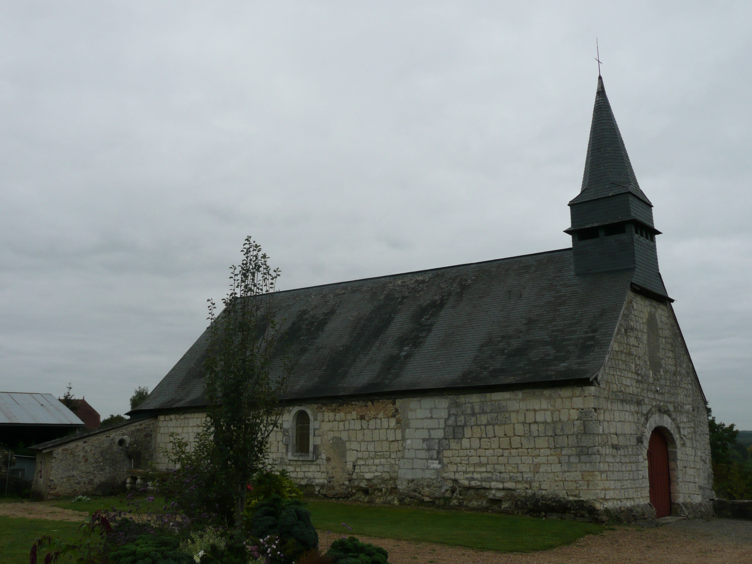 Soucelles - Chapelle de la Roche-Foulques .